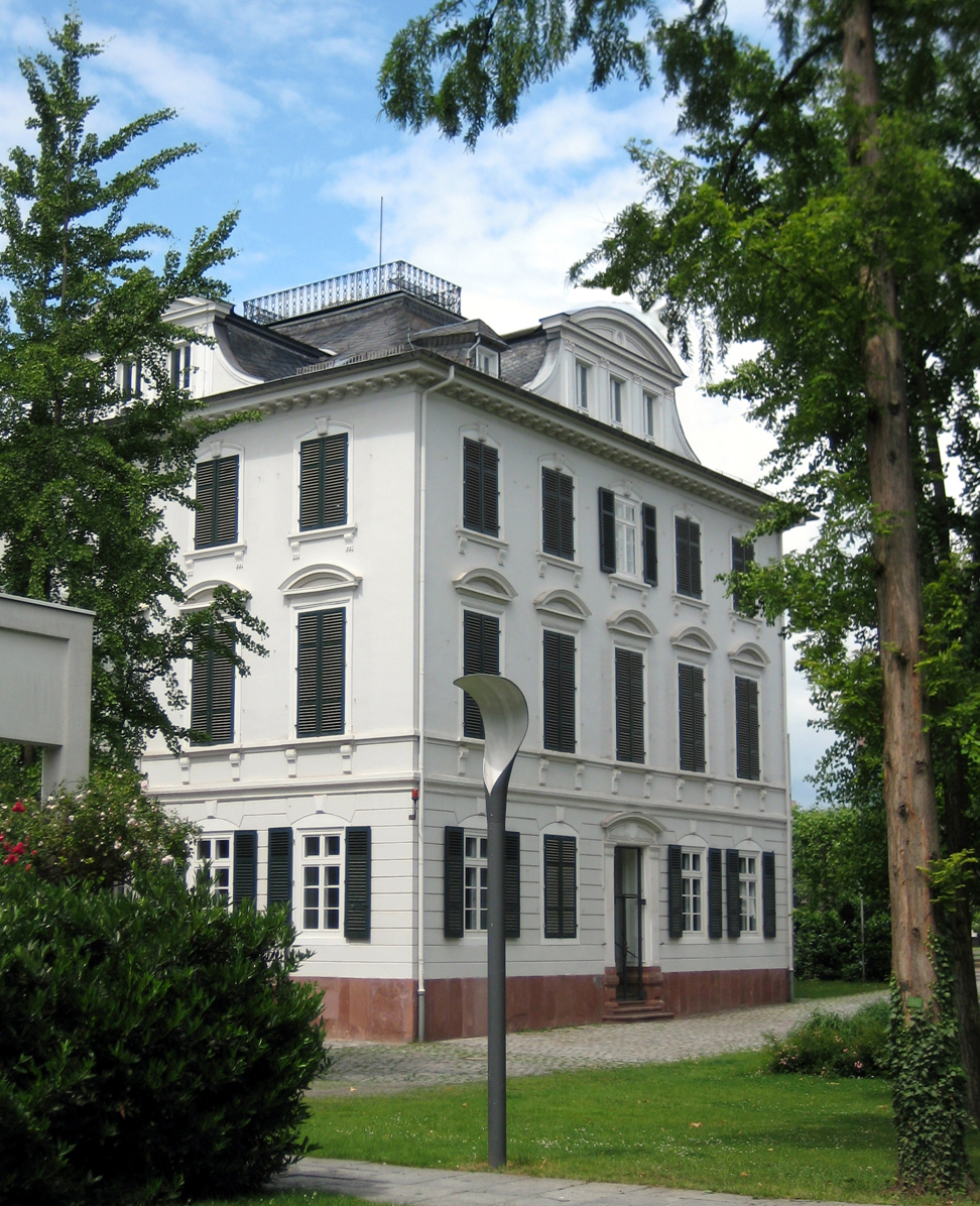 Villa Metzler und Park, Frankfurt am Main, gen Norden